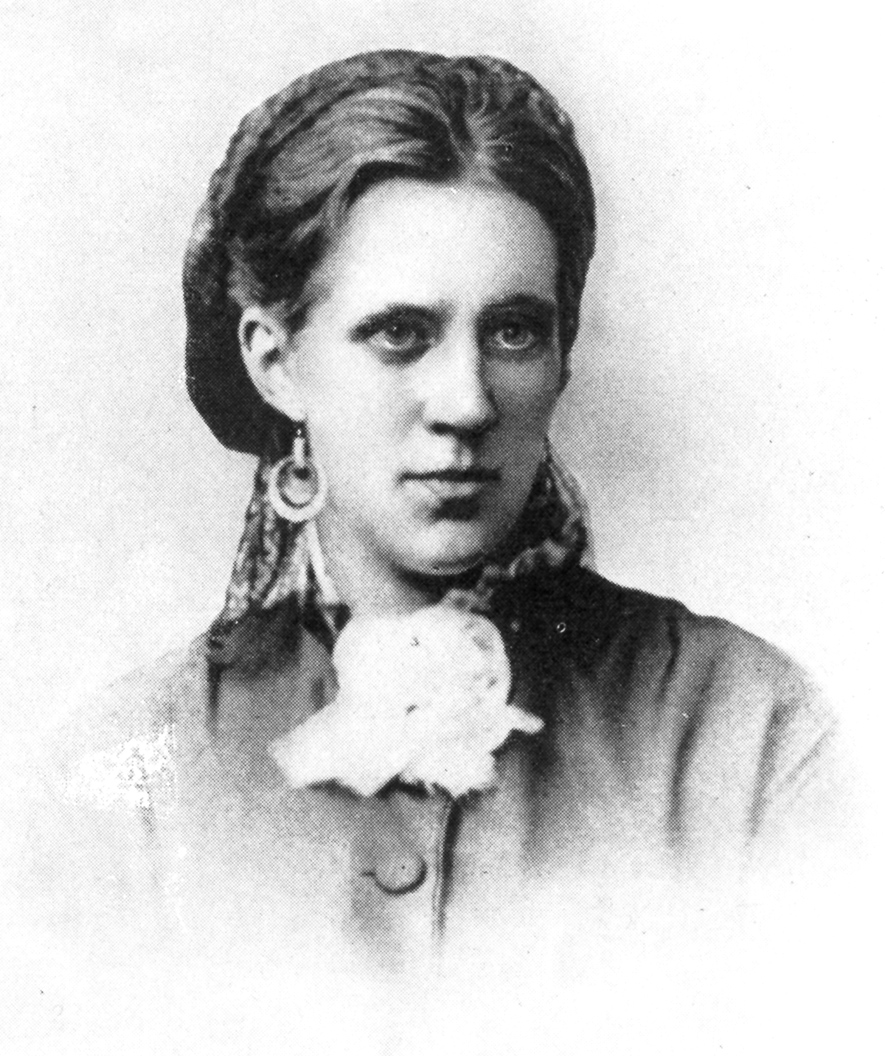 Anna Dostoyevskaya.